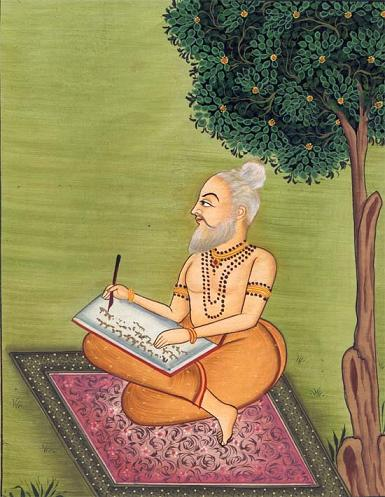 Valmiki escribe el Ramayana